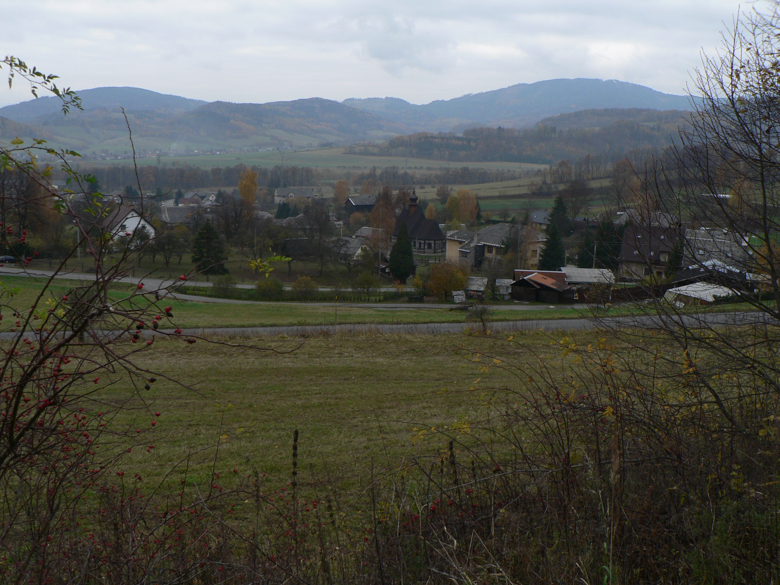 Pohled na centrum Maršíkova s dřevěným kostelem sv. Michala